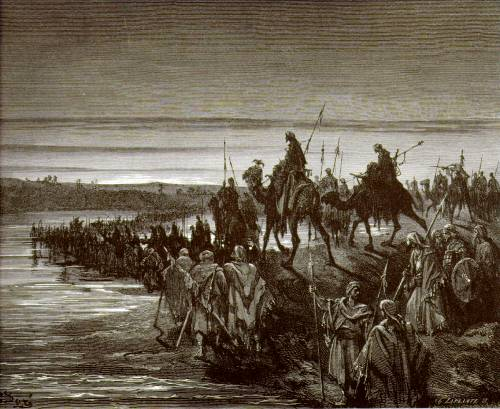 Gravure de Gustave Doré